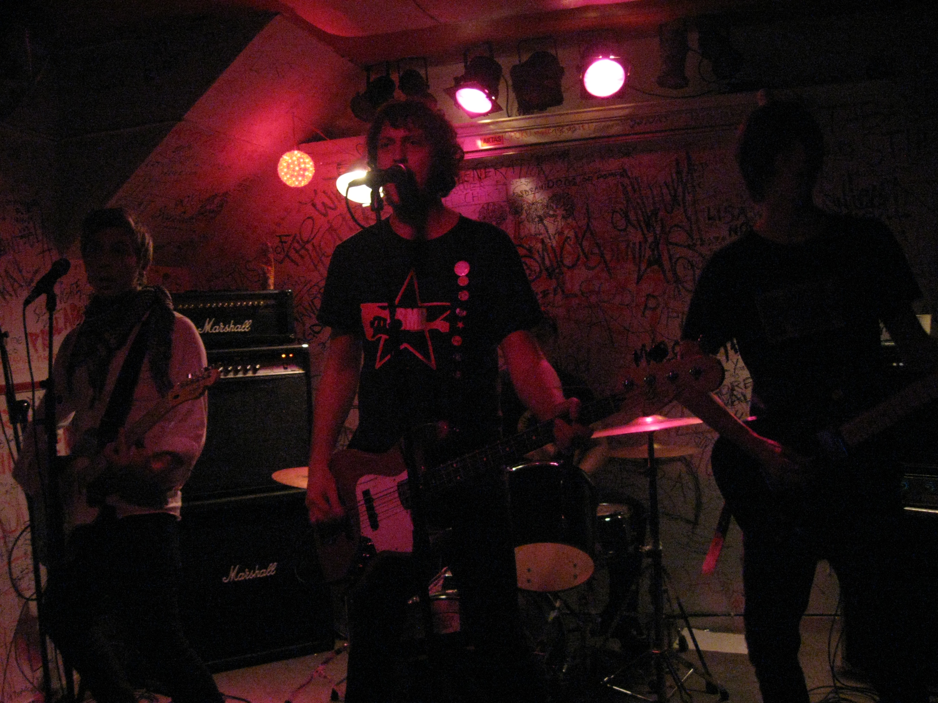 Monark X performs at Gula Villan in Handen, Stockholm.